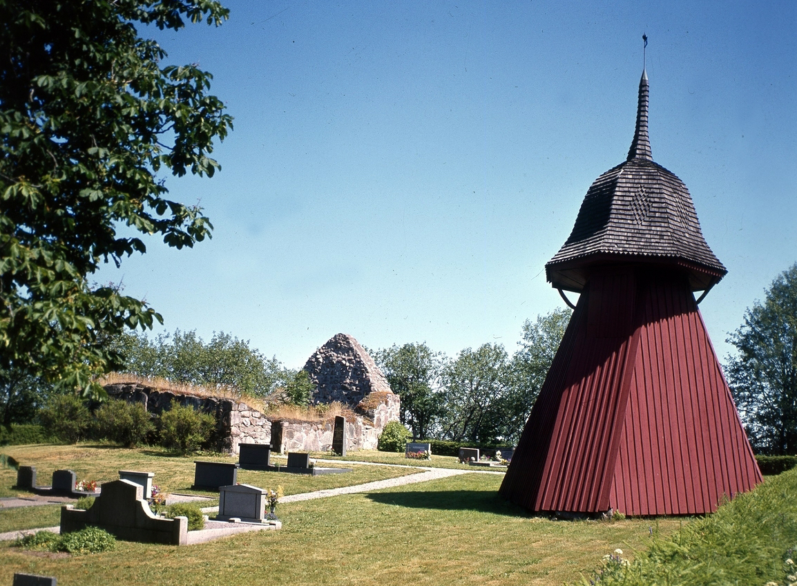 Södra Vånga kyrkoruin